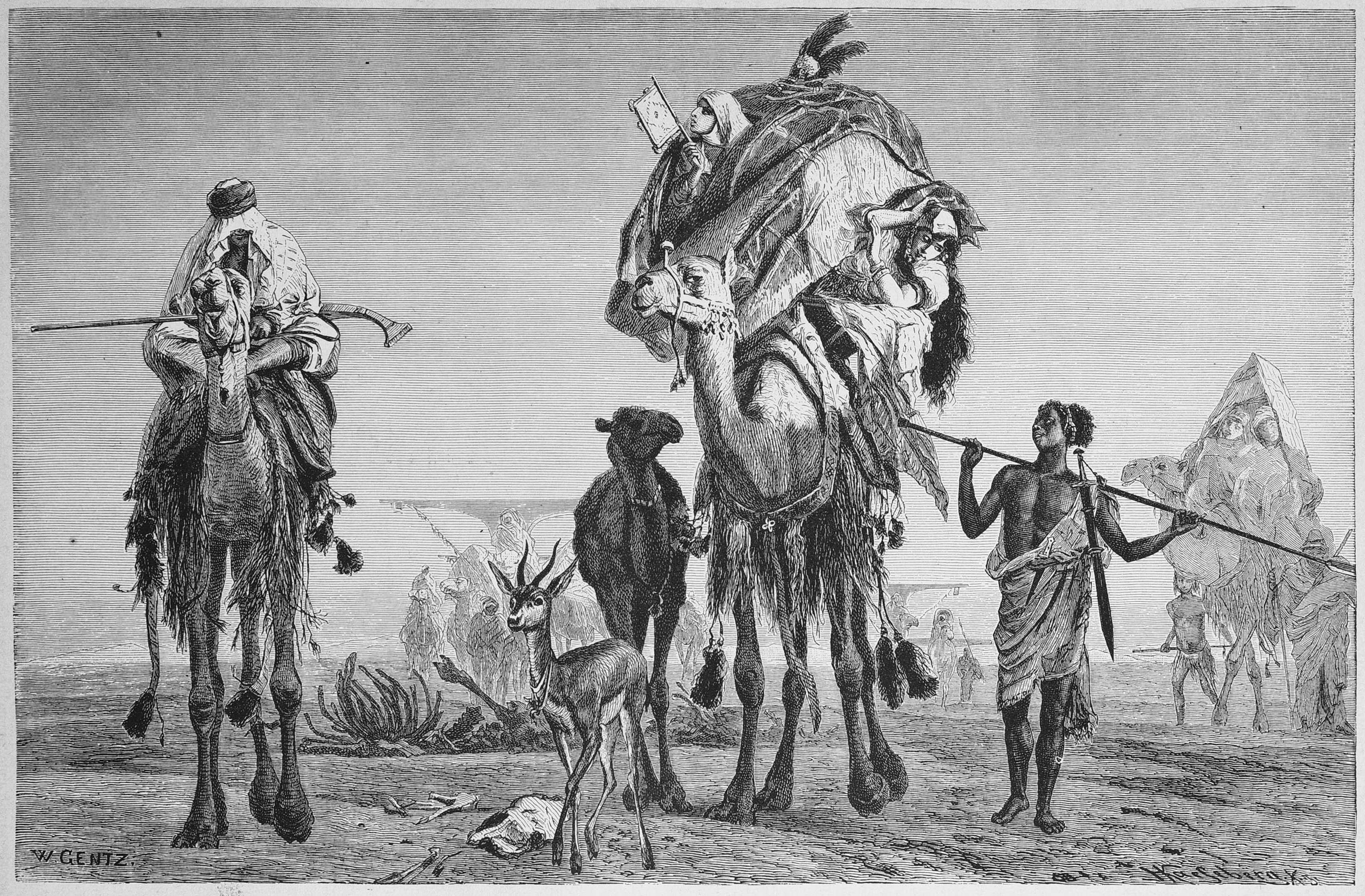 Wilhelm Gentz Der wandernde Harem eines Beduinen in der Wüste, nach dem Wandgemälde im Palais Pringsheim in Berlin.